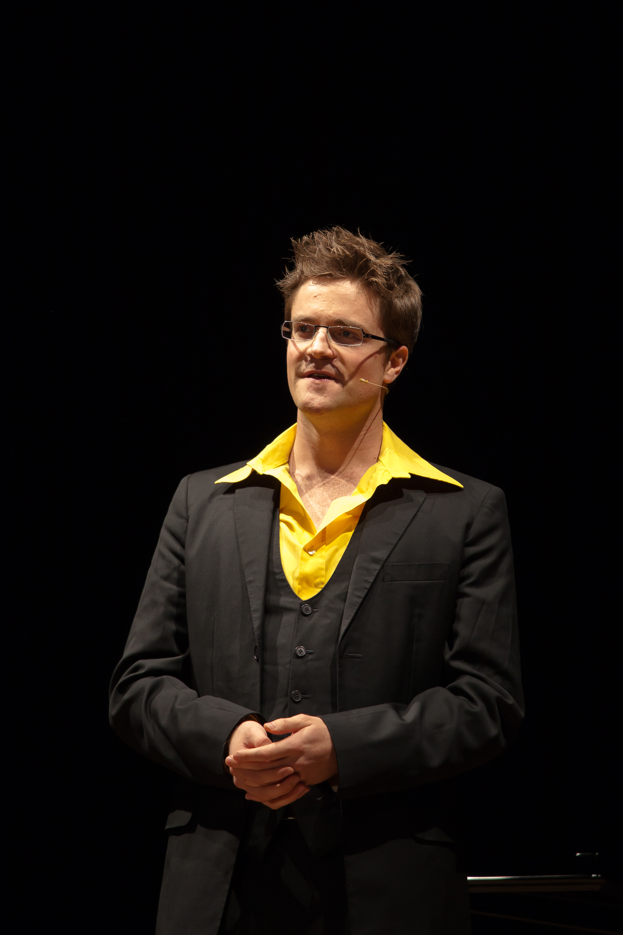 Bodo Wartke bei seinem Konzertauftritt mit dem Programm "Achillesverse" im September 2011 in der Rostocker Stadthalle